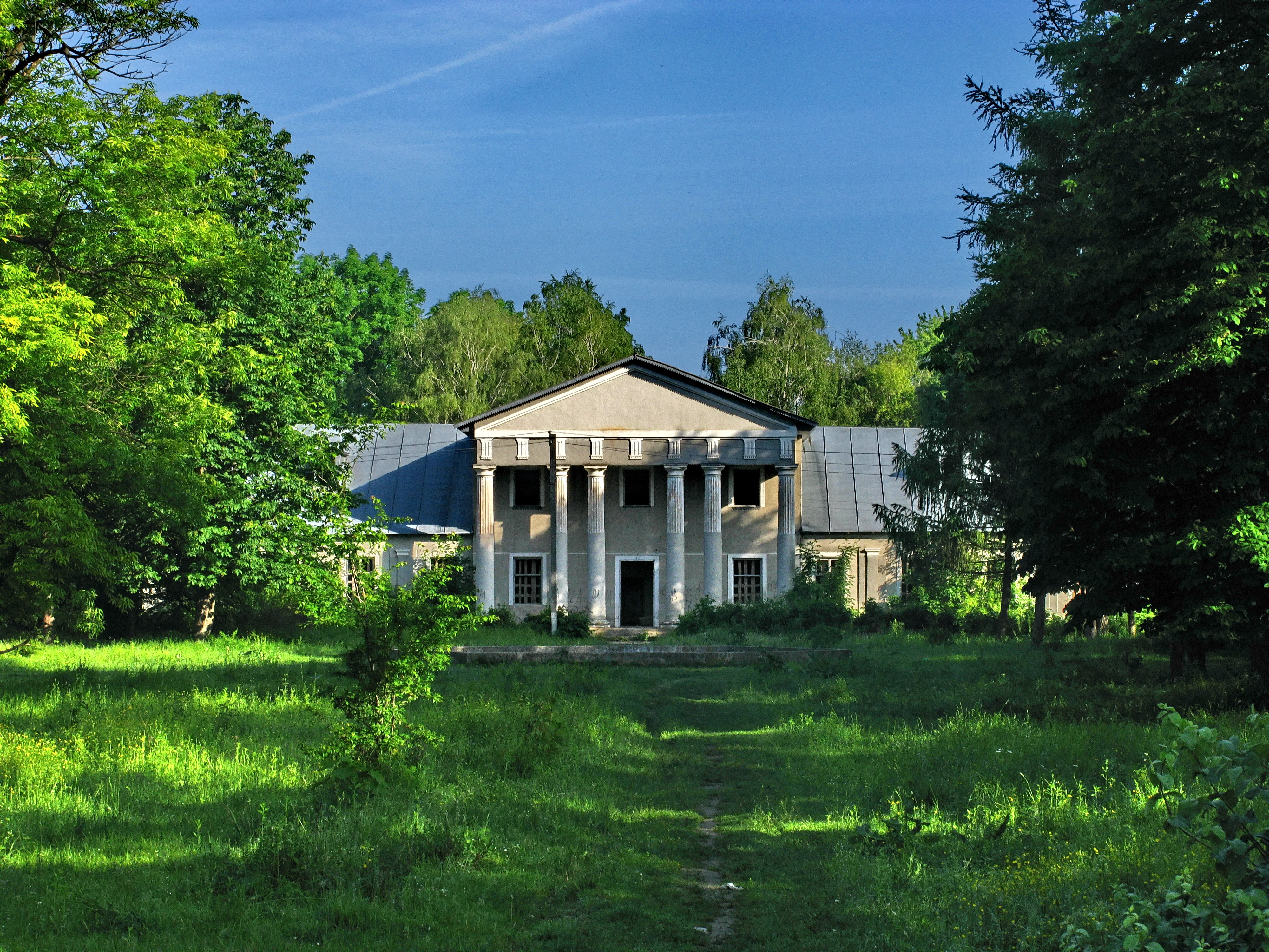 Комплекс маєтку(мур.), Хоростків, вул.Музейна,3